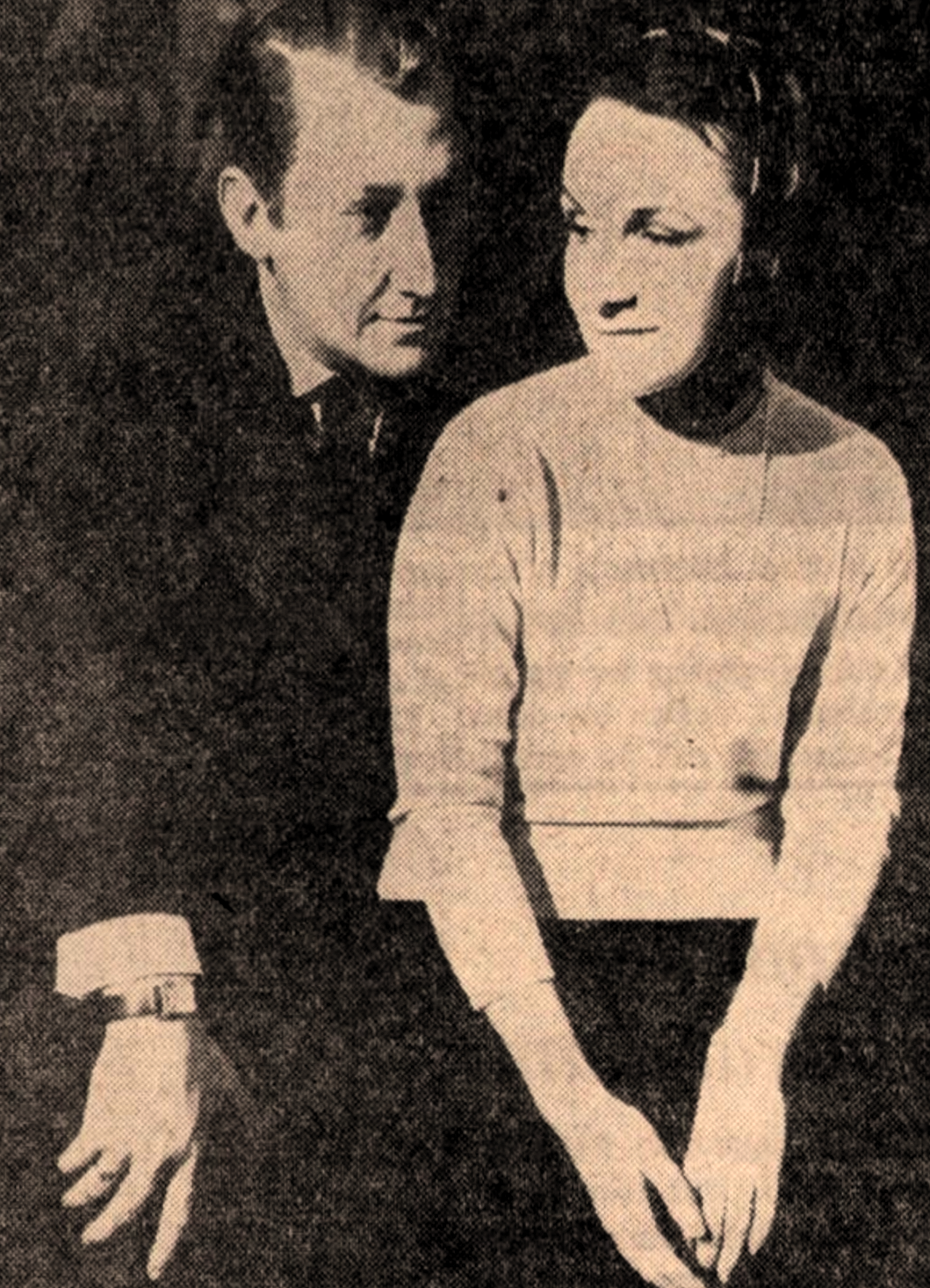 Bengt Eklund, Catrin Westerlund (1961), under en repetion inför premiären på pjäsen Mobergs "Nattkyparen" på Dramatens lilla scen.